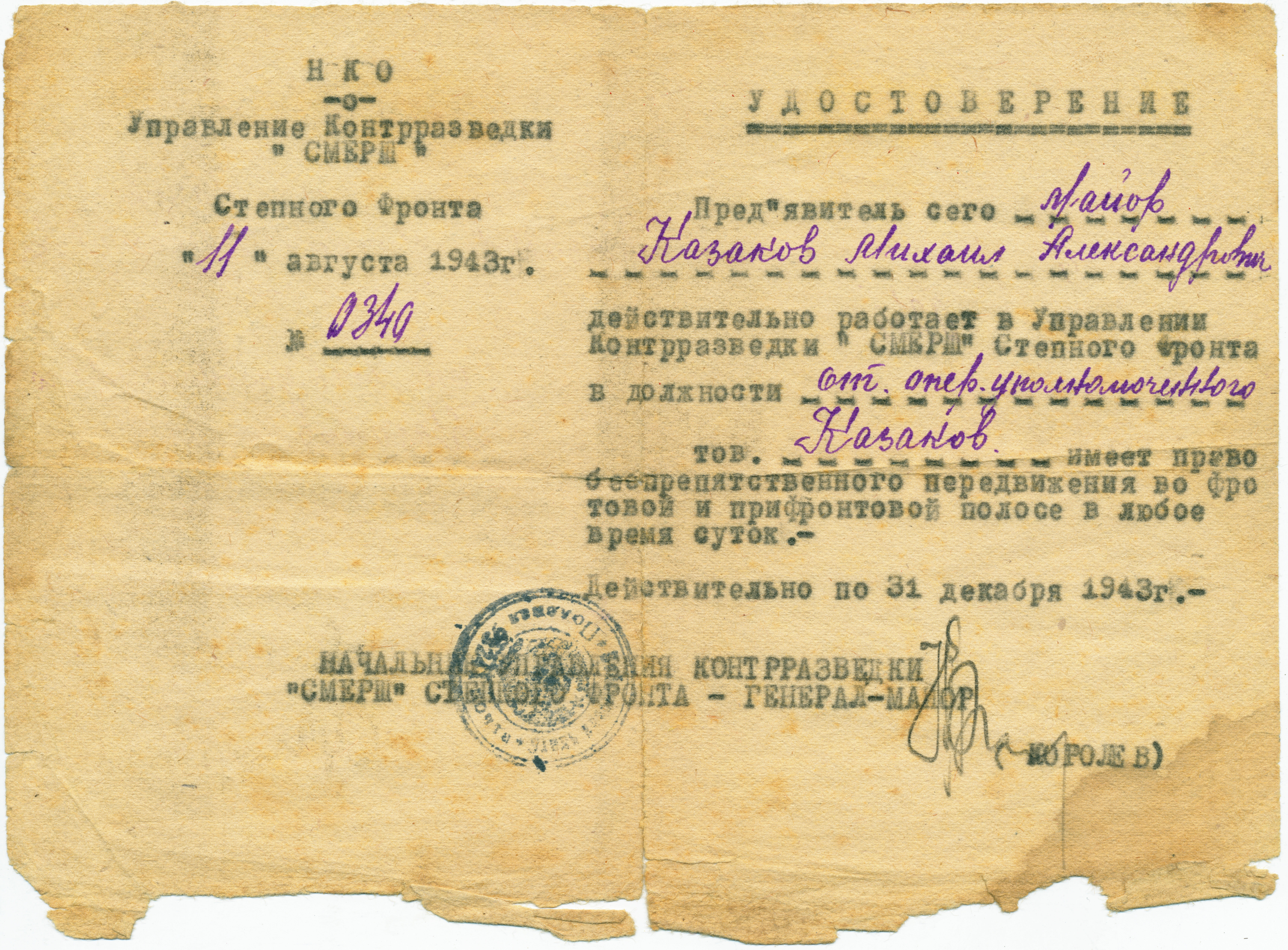 НКО Управление Контрразведки "СМЕРШ" Степного Фронта 11 августа 1943 г. № 0340 Удостоверение Предъявитель сего майор Казаков Михаил Александрович действительно работает в Управлении Контрразведки "СМЕРШ" Степного Фронта в должности ст. опер. уполномоченного. Тов. Казаков имеет право беспрепятственного передвижения во фронтовой и прифронтовой полосе в любое время суток. Действительно по 31 декабря 1943 г. Начальник управления контрразведки "СМЕРШ" Степного Фронта - генерал-майор Королев